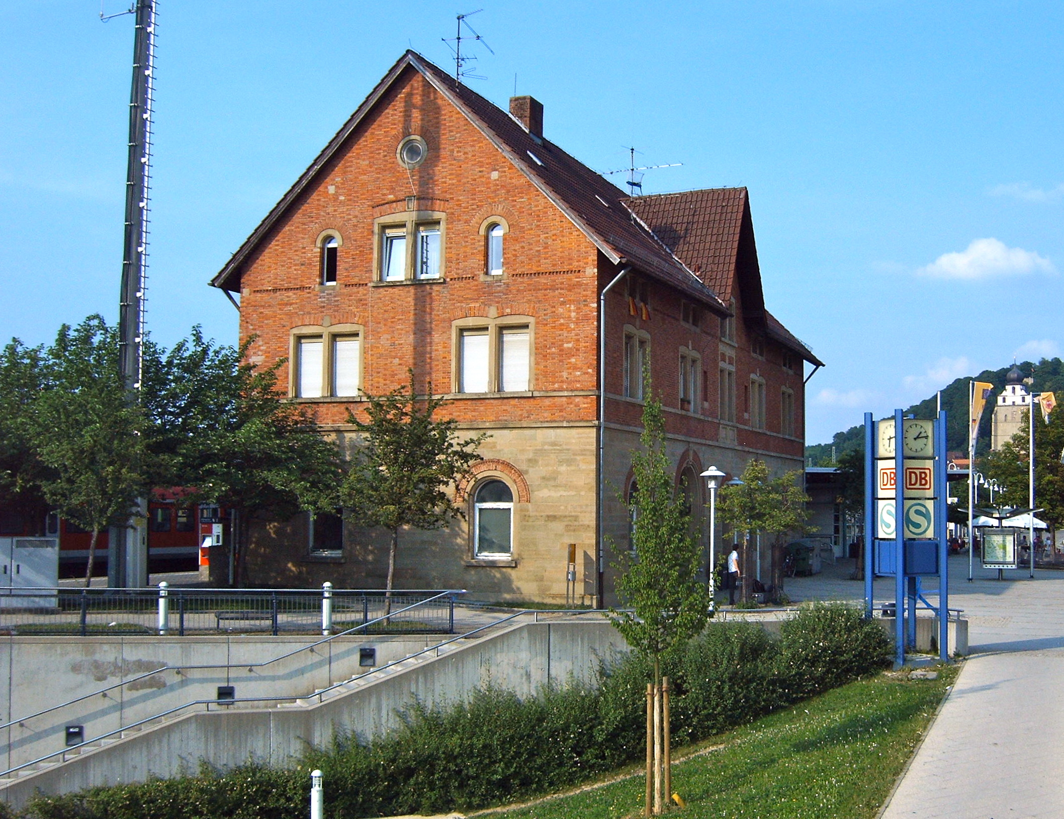 Bahnhof Herrenberg mit Abgang zur Unterführung